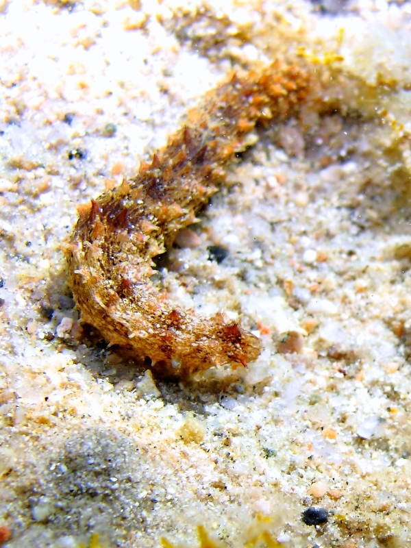 Holothuria impatiens (dalla Sardegna)